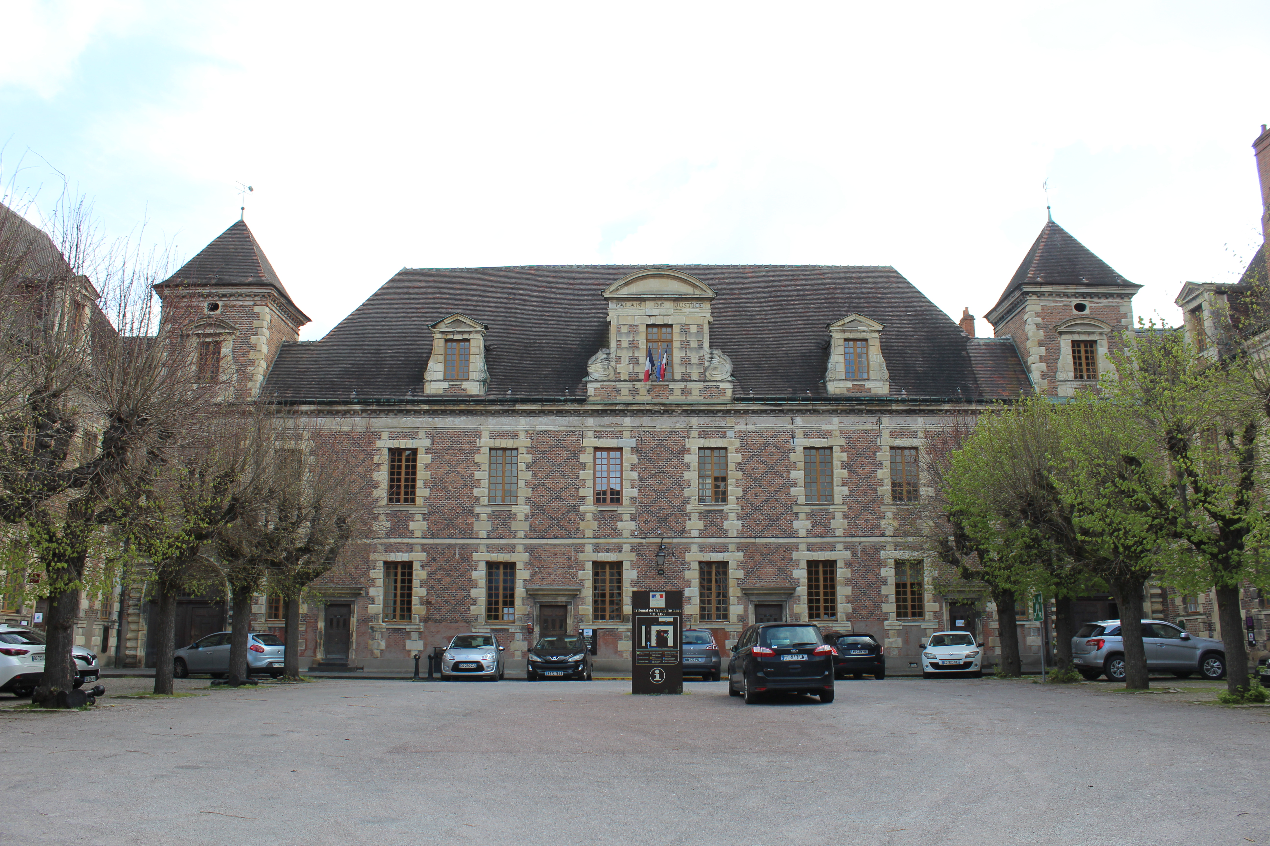 Ancien collège des Jésuites, palais de justice, Moulins, Allier.